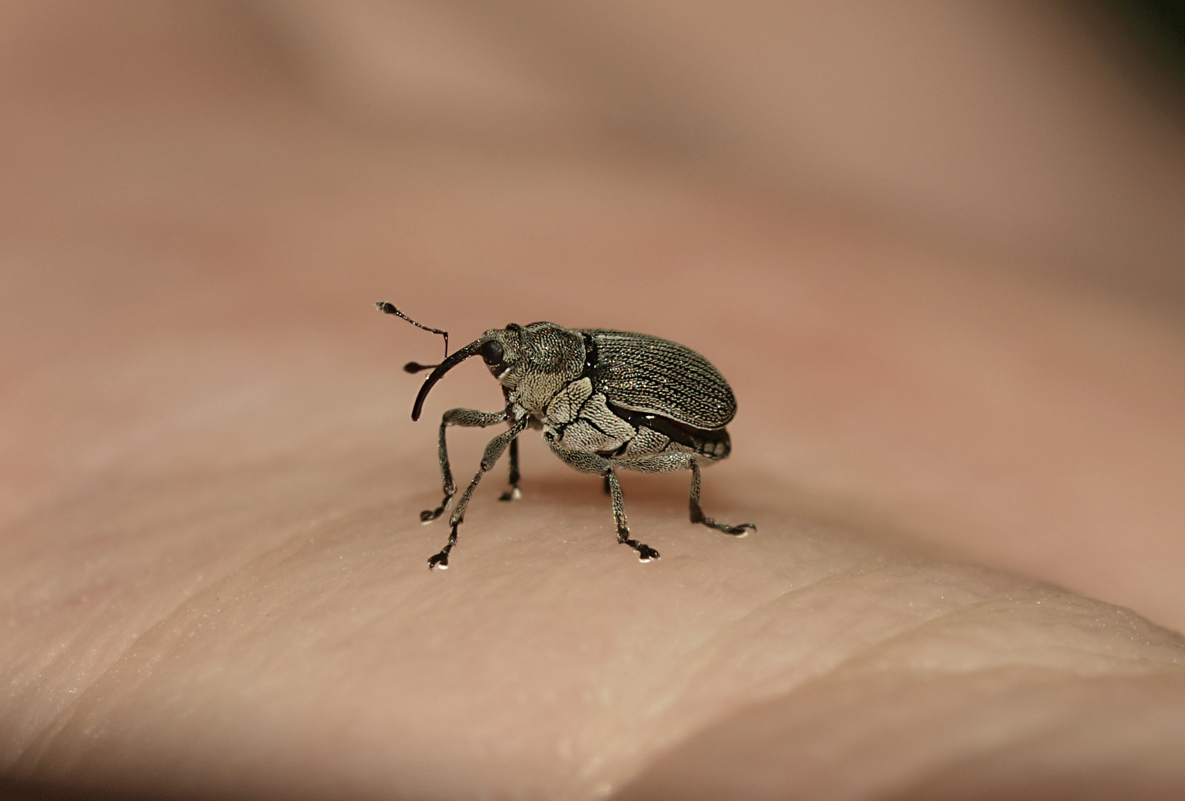 Blygrå rapssnudebille.